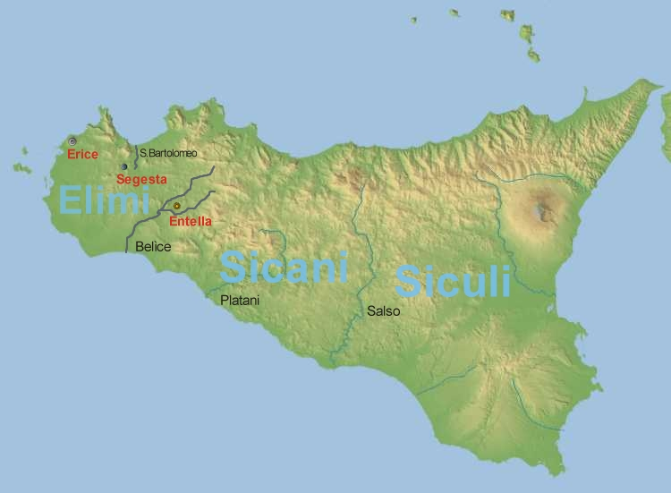 Percorso del Fiume Belice, antico Crimiso, e città elime